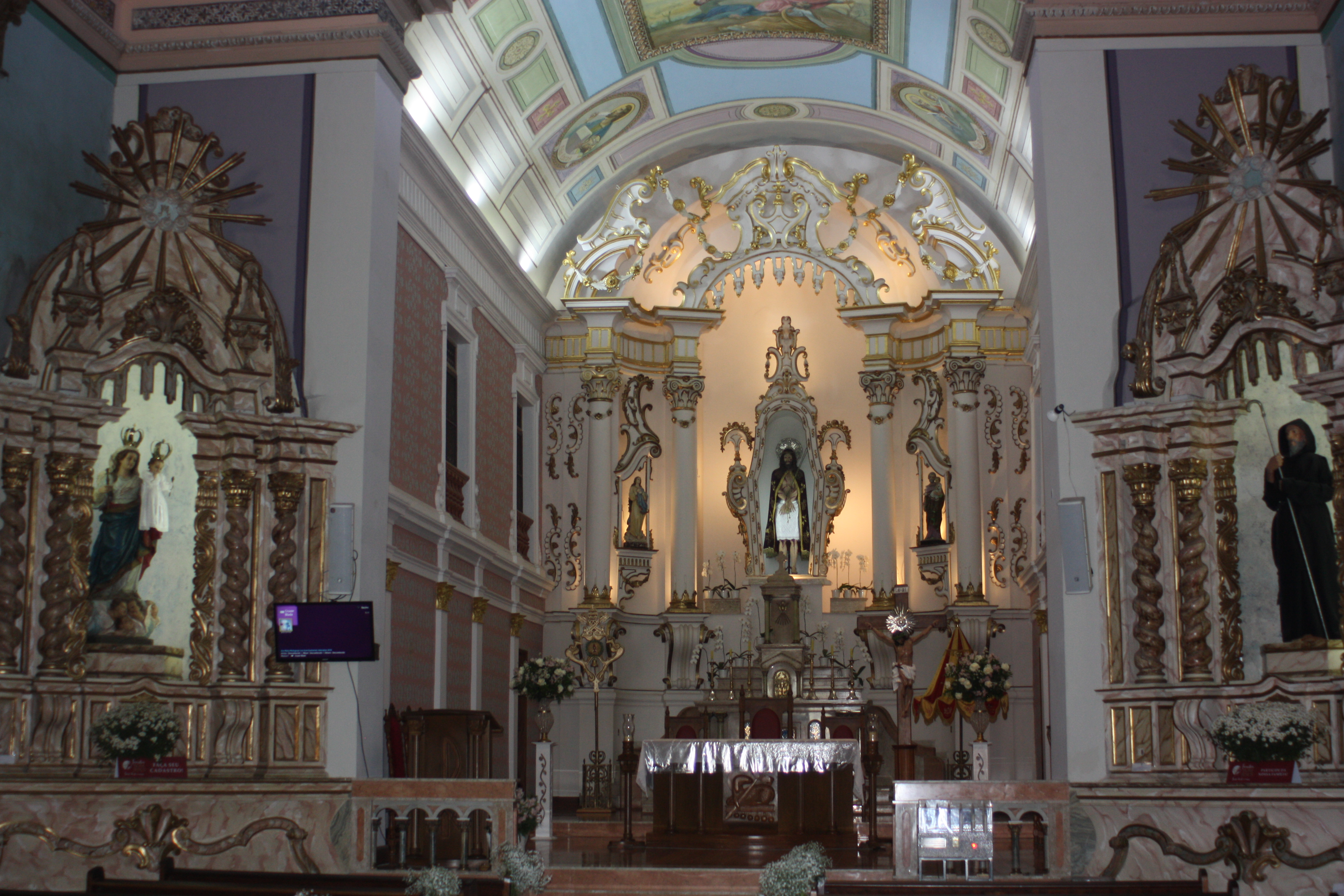 Visão interior da Basílica Bom Jesus de Tremembé com seu magnífico altar. Cultural property Basilica of the Good Lord Jesus, Tremembé, Tremembé, São Paulo, Brazil Q16502036